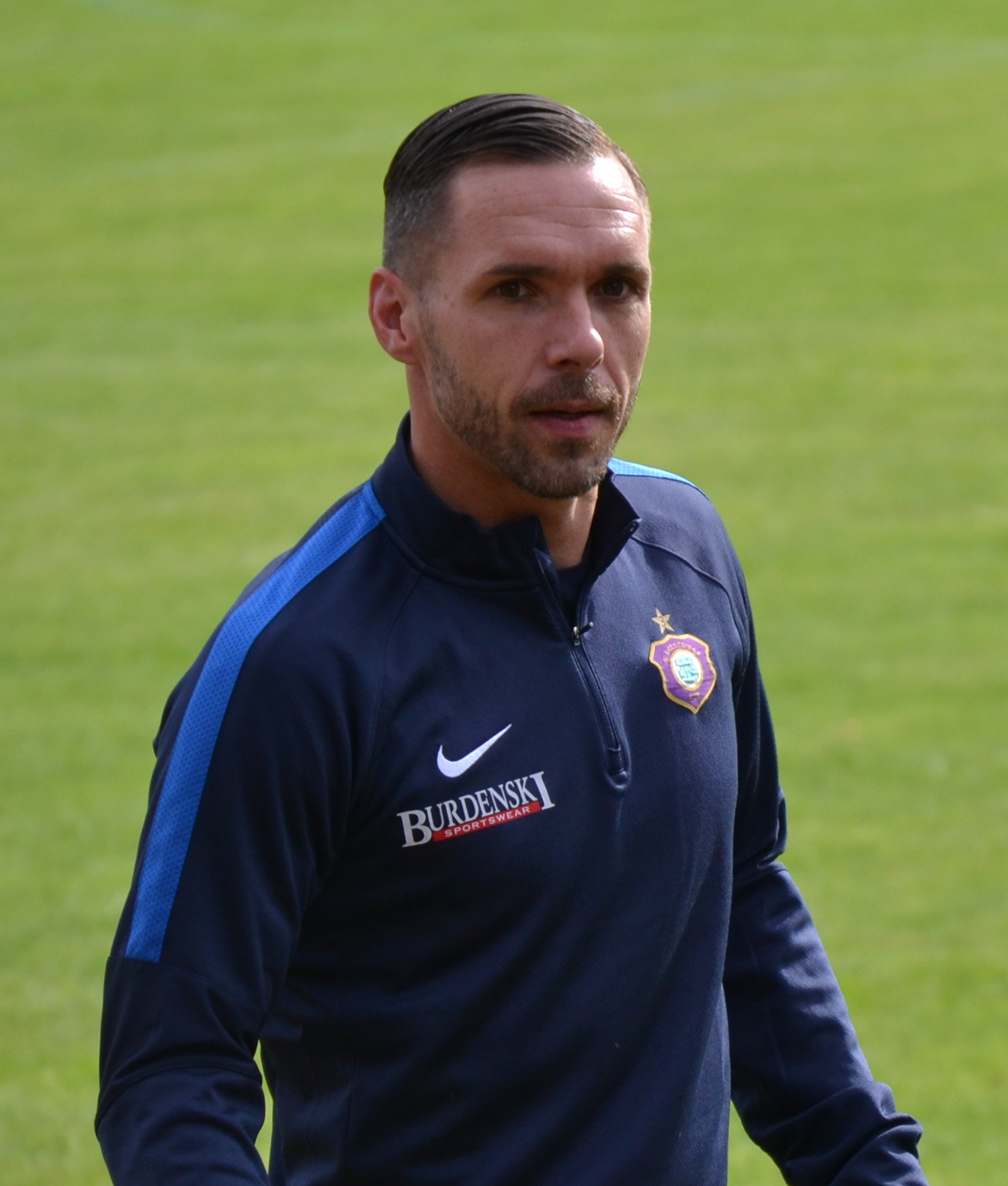 Christian Tiffert beim Freundschaftsspiel zwischen Erzgebirge Aue und dem HFC Colditz